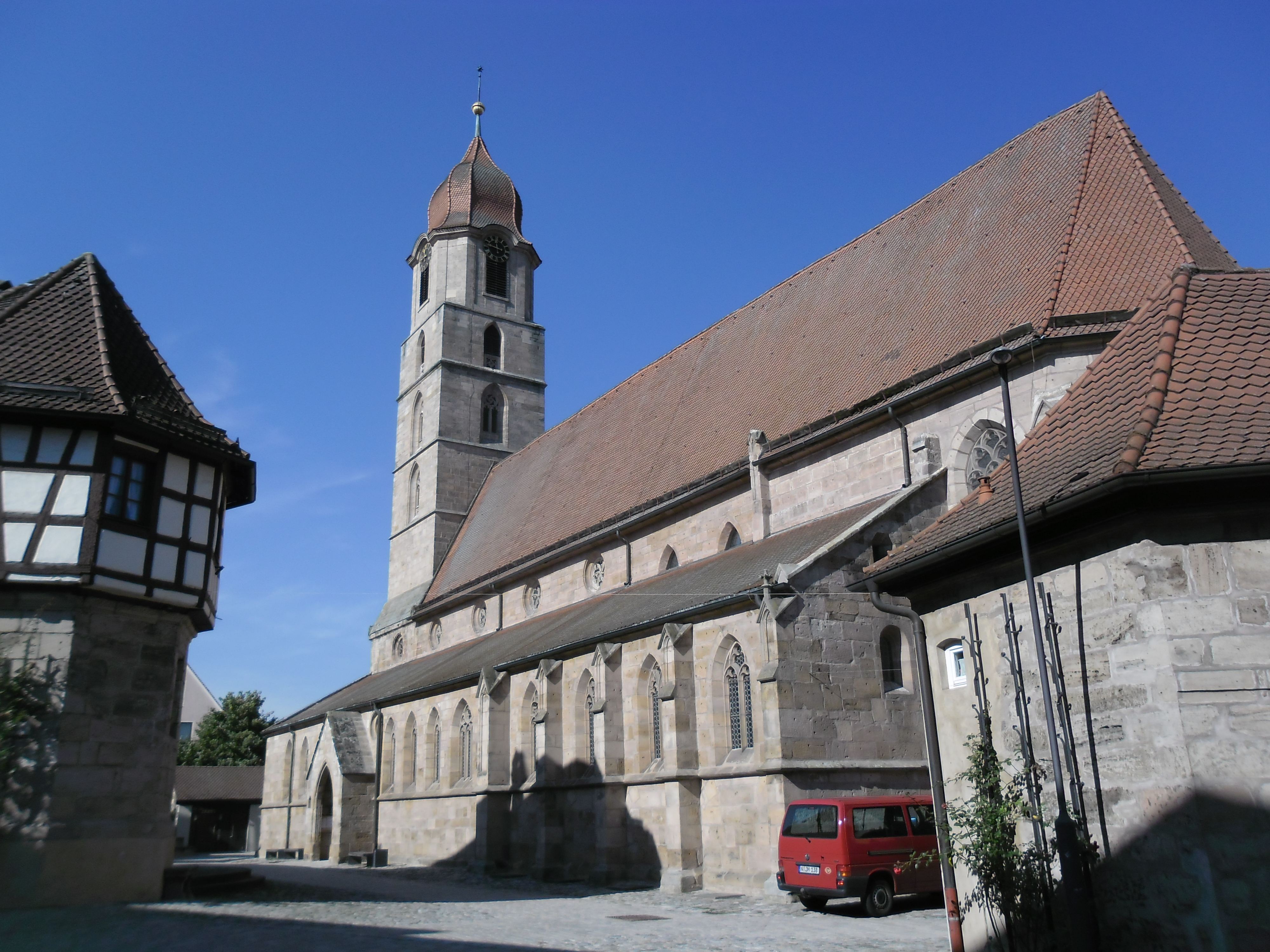 siehe Bildtitel